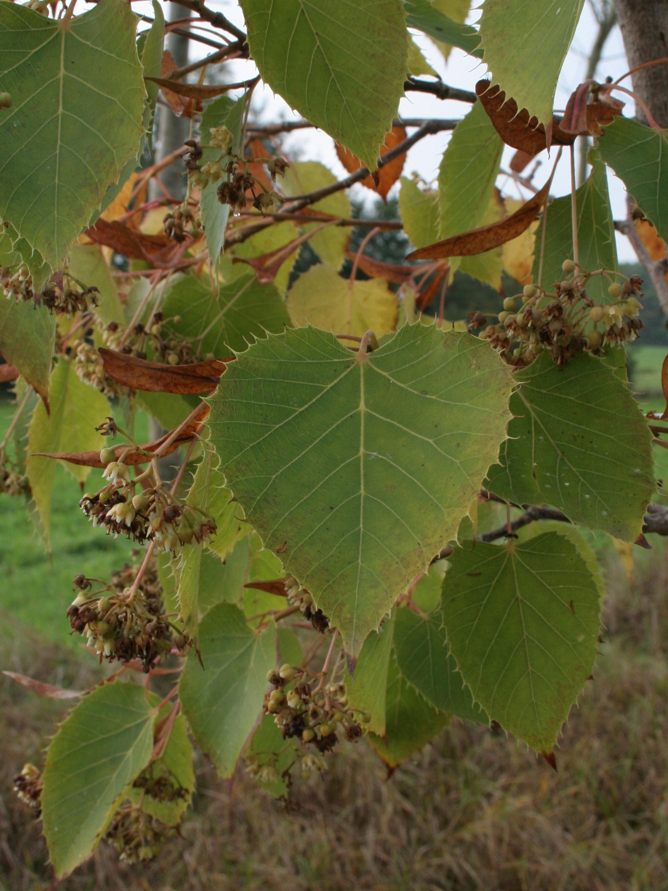 Tilleul de Henry, Celsoy, Haute-Marne, France.